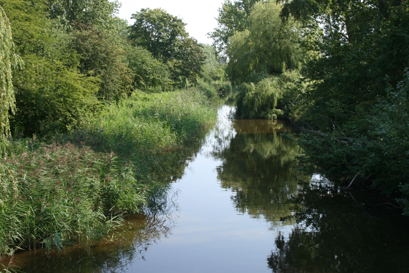 Århus Å ved Vestre Ringgade i Århus.